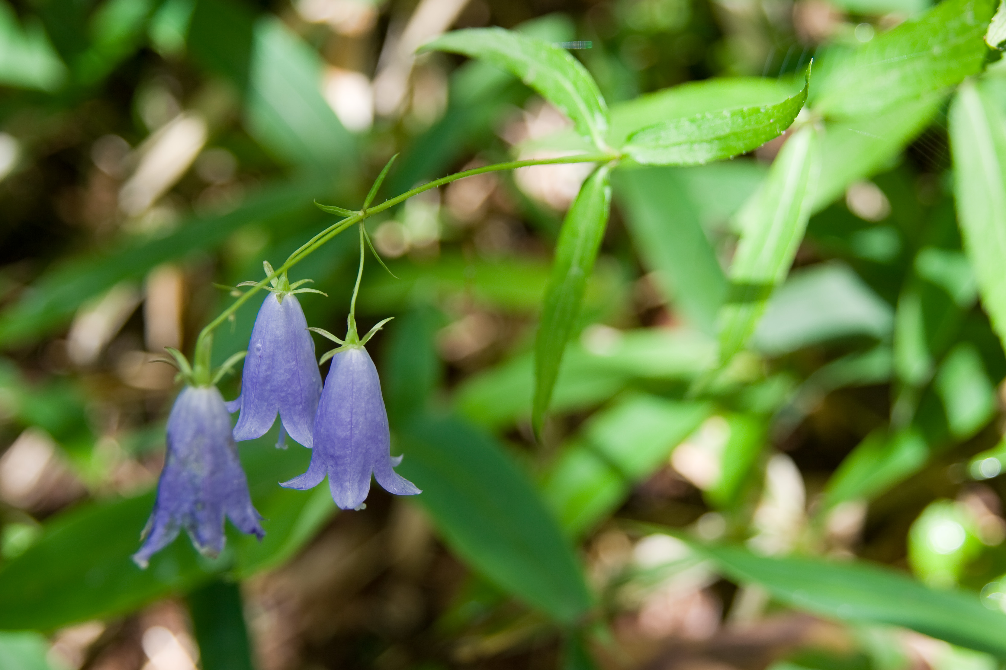 ヒメシャジン (学名:Adenophora nikoensis)